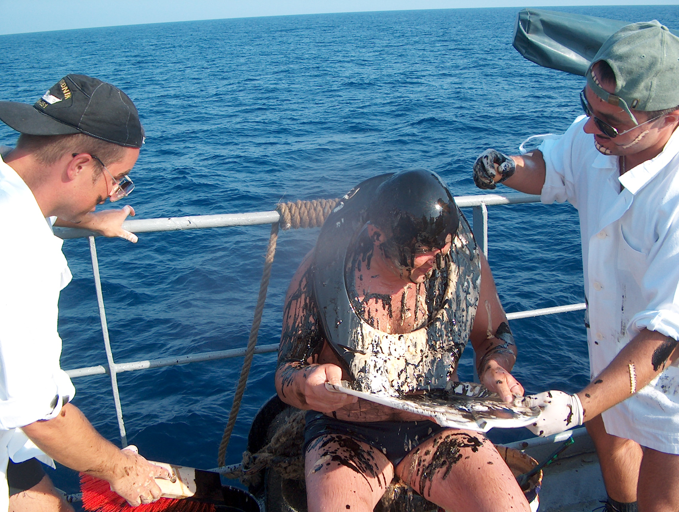 Chrzest morski na ORP Wodnik